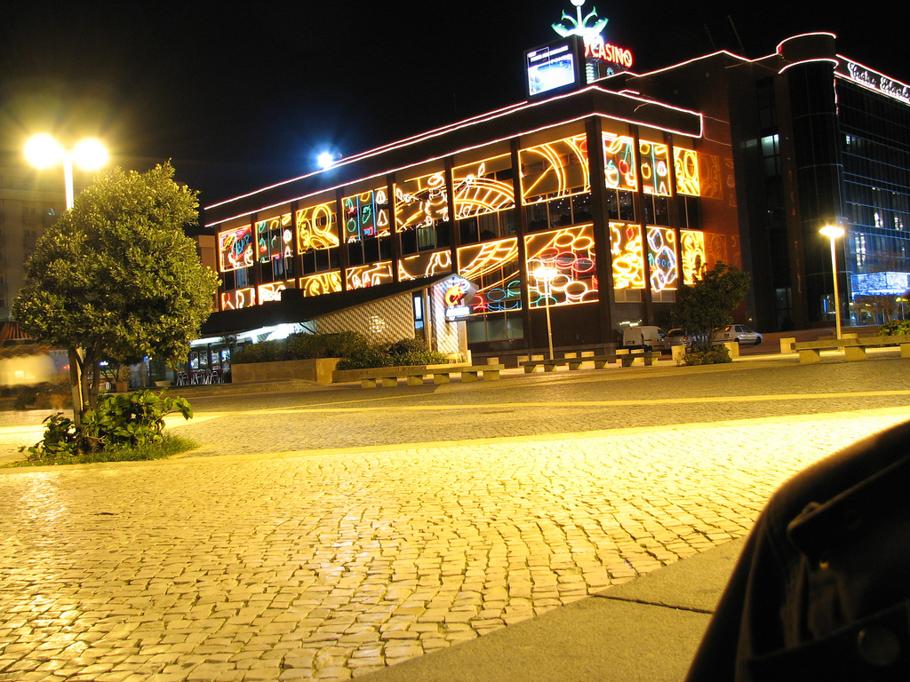 Casino